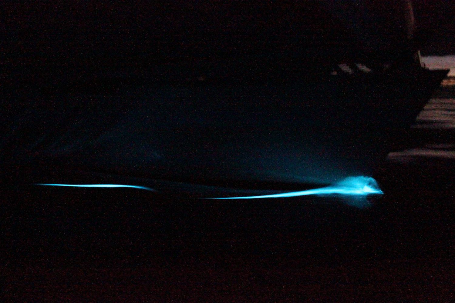 Bugwelle eines Segelschiffs nachts in der Nordsee